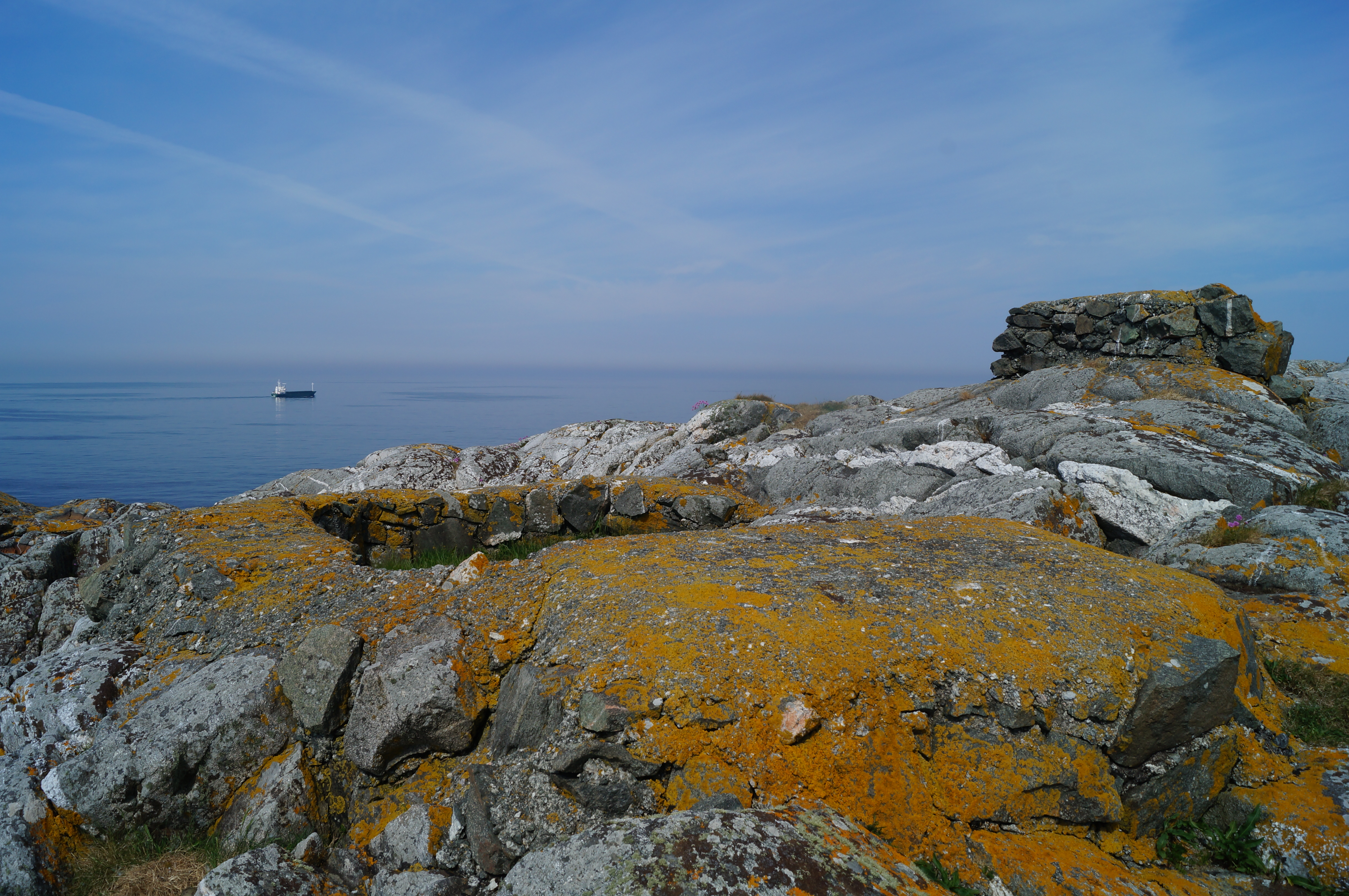 Skytestillinger fra andre verdenskrig på Marstein fyrstasjon